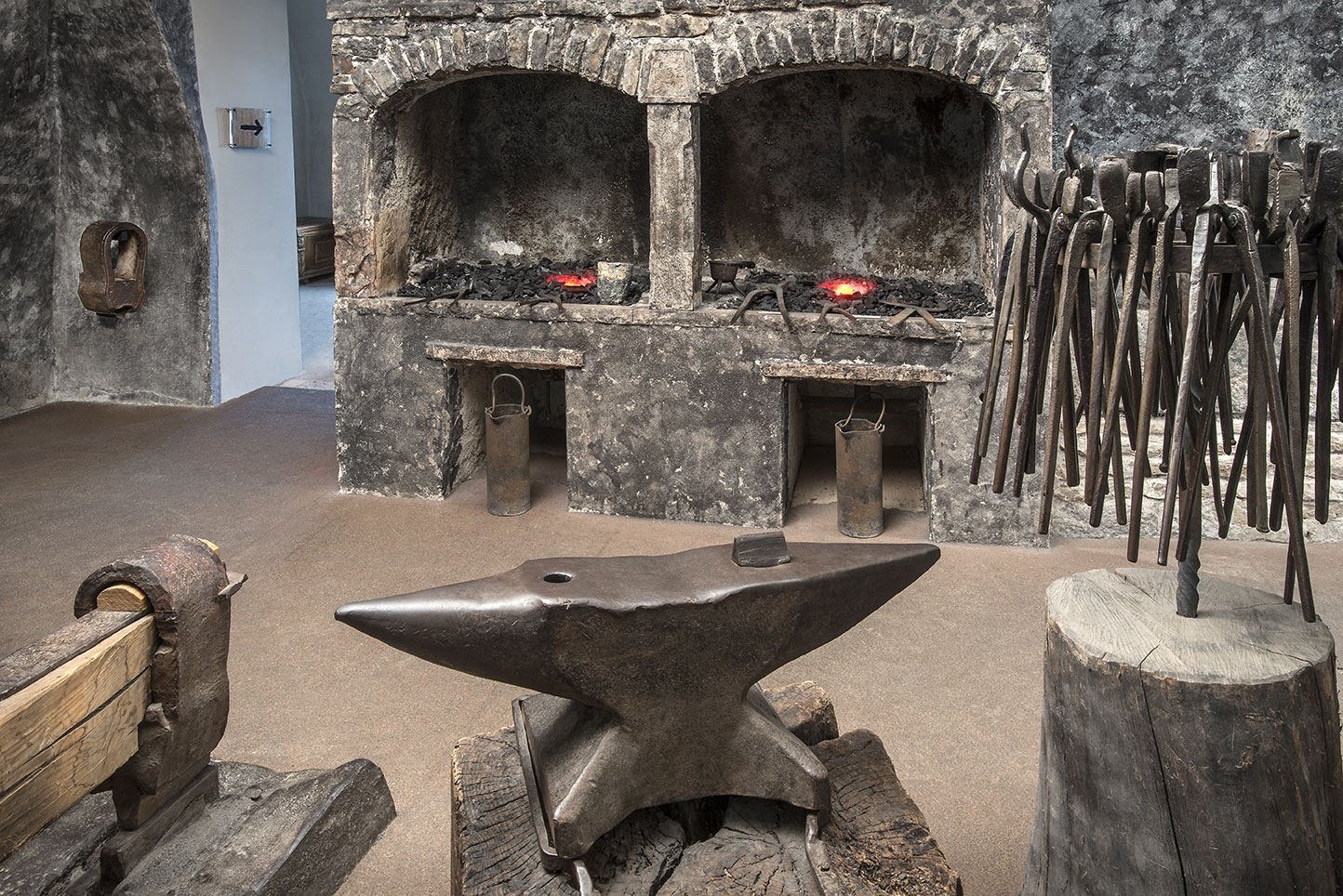 Sala del fabbro ferraio del Museo degli Usi e Costumi della Gente Trentina